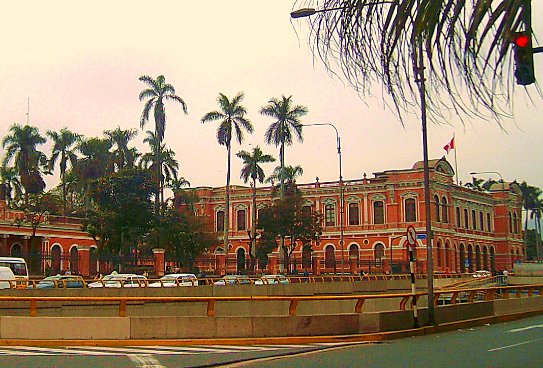 Facultad de Medicina "San Fernando" de la Universidad Nacional Mayor de San Marcos; Lima, Perú.